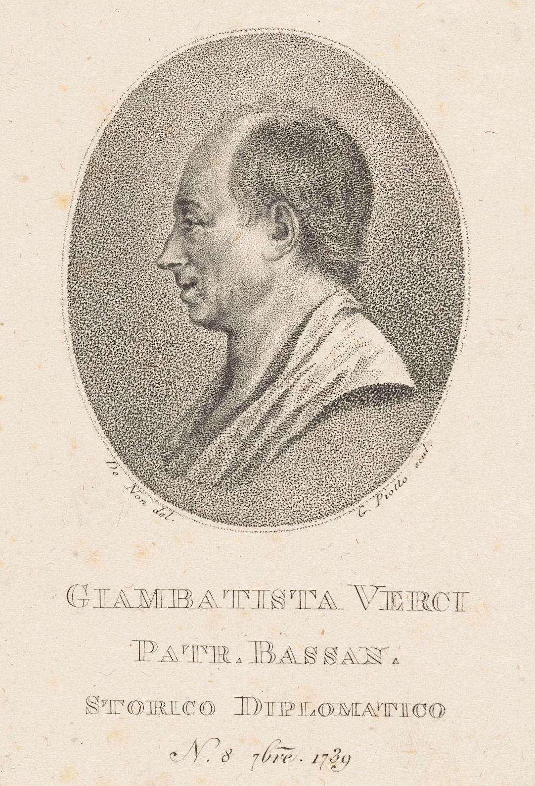 IdentificatieTitel(s): Portret van schrijver en historicus Giambattista VerciObjecttype: prent Objectnummer: RP-P-1909-5199Opschriften / Merken: verzamelaarsmerk, verso, gestempeld: Lugt 2228VervaardigingVervaardiger: prentmaker: G. Piotto (vermeld op object)naar tekening van: onbekend (vermeld op object)Plaats vervaardiging: ItaliëDatering: in of na 1759Fysieke kenmerken: stippelgravureMateriaal: papier Techniek: stippelgravureAfmetingen: blad: h 141 mm (Binnen plaatrand afgesneden.) × b 90 mm (Binnen plaatrand afgesneden.)OnderwerpWat: historical personsportrait of a writerWie: Giambattista VerciVerwerving en rechtenVerwerving: aankoop 1905Copyright: Publiek domein